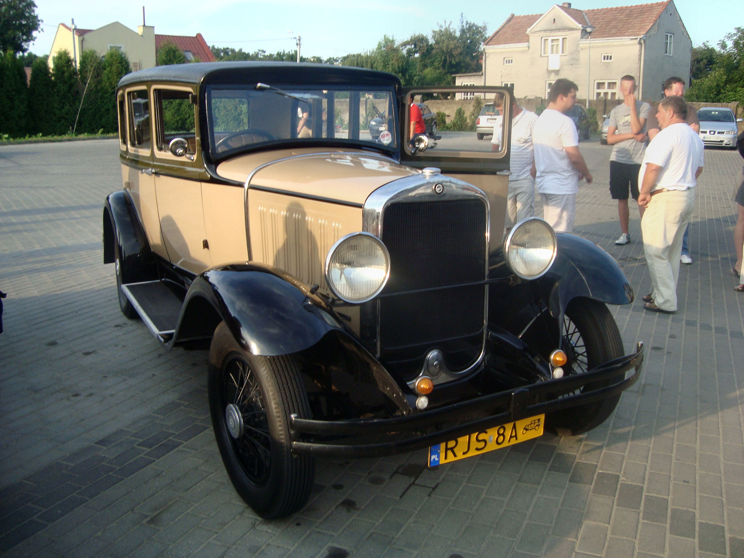 Studebaker z 1927 roku w Jaśle.